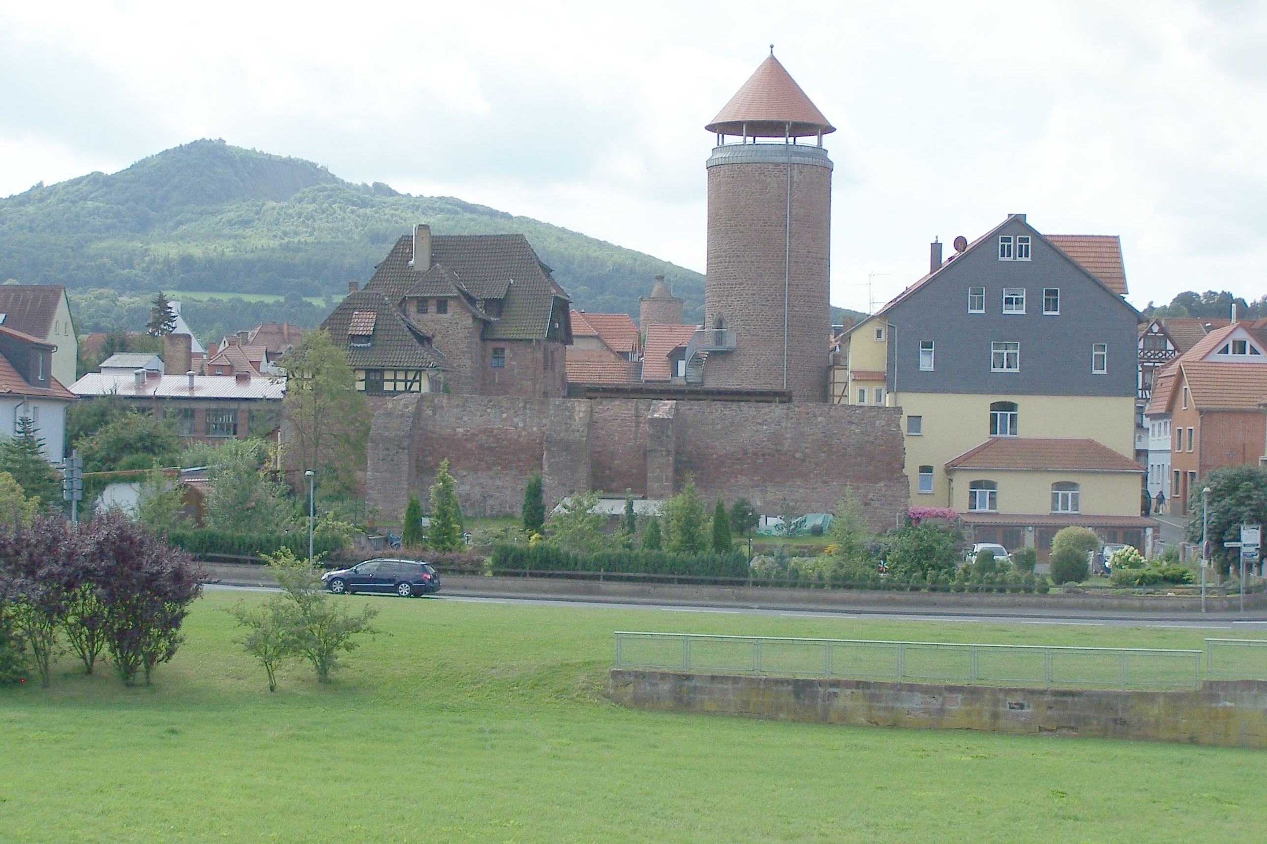 Hof- und Au�enansichten der Burganlage.